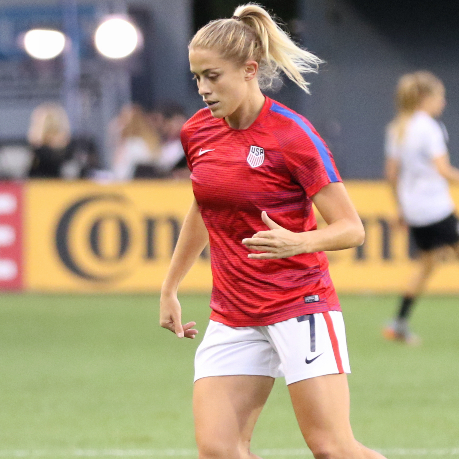 AbbyDahlkemper